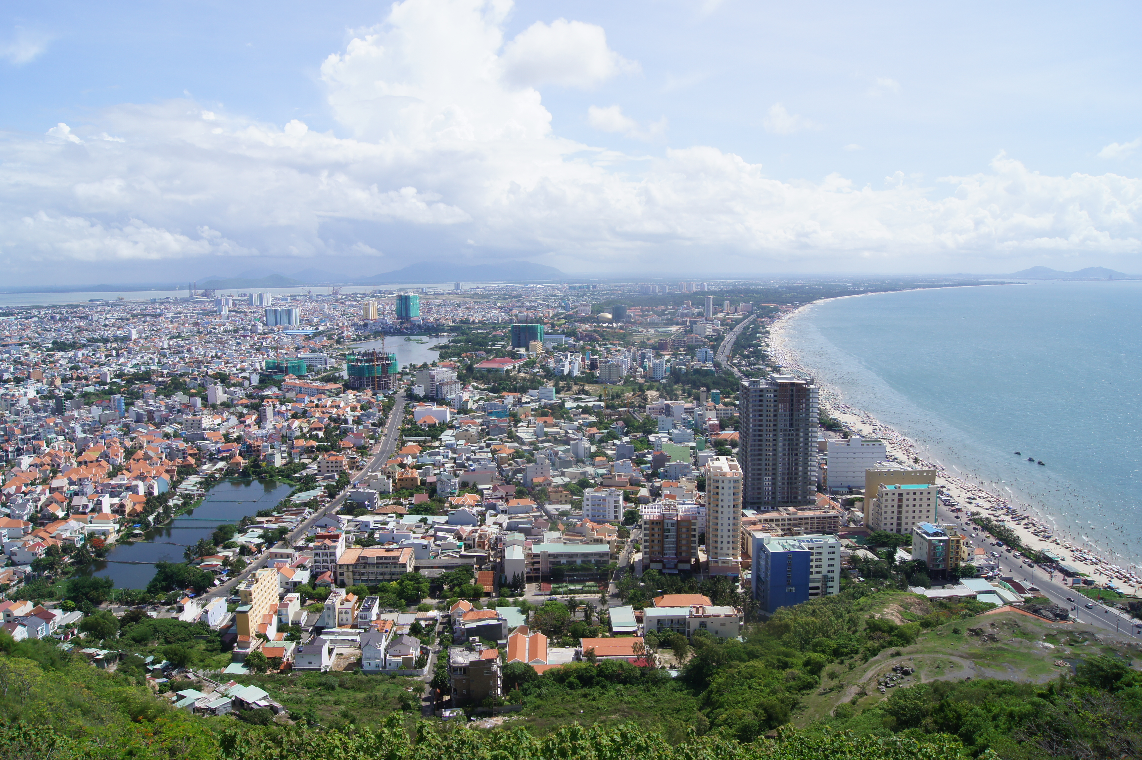 Một phần Vũng Tàu nhìn từ Tượng chúa Ki-tô trên núi Tao Phùng.